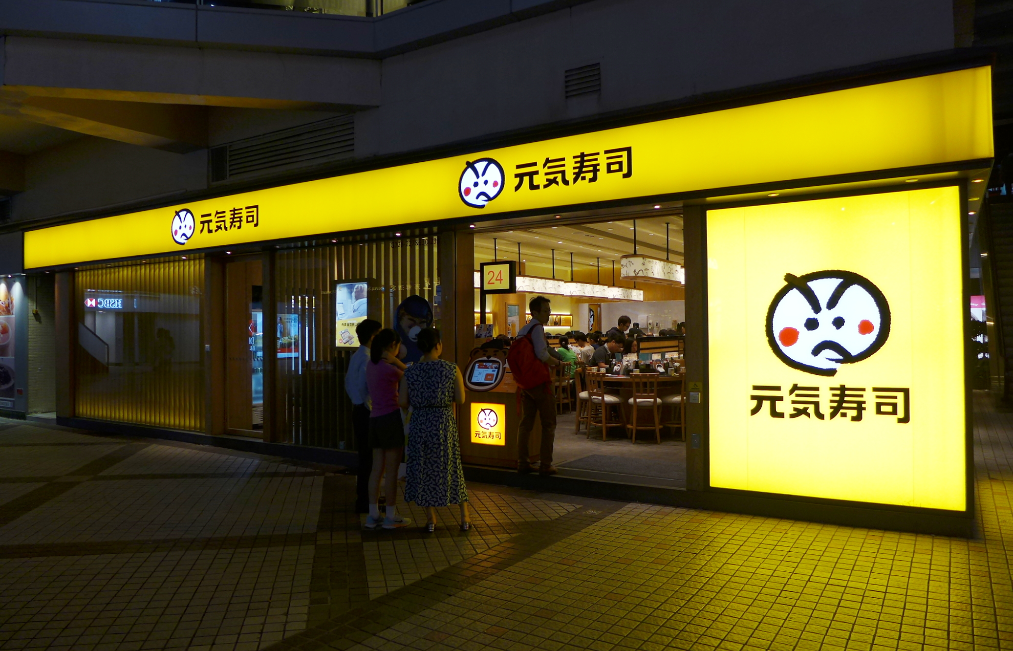 Genki Sushi in Amoy Plaza